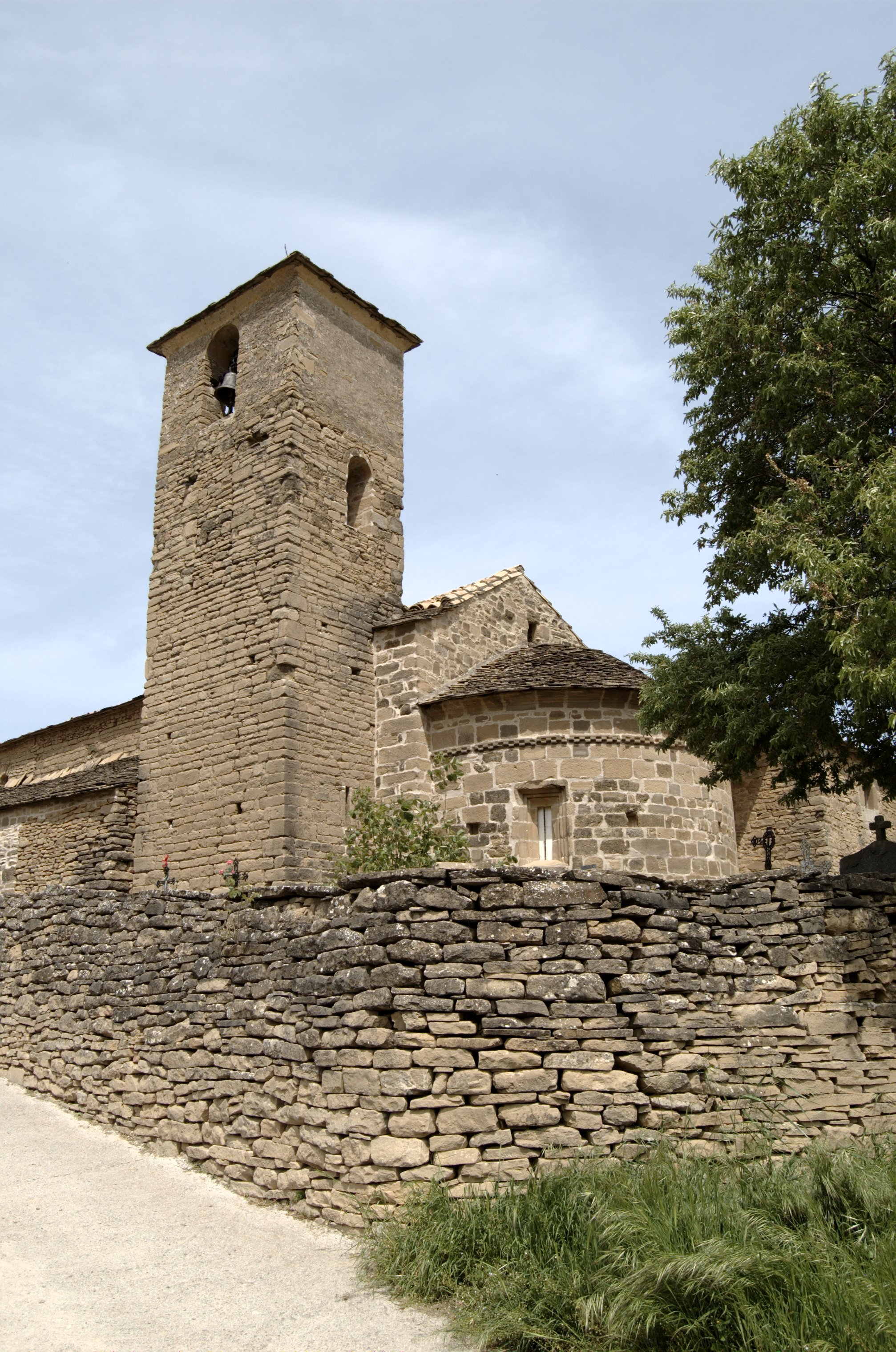 Iglesia de Alastuey